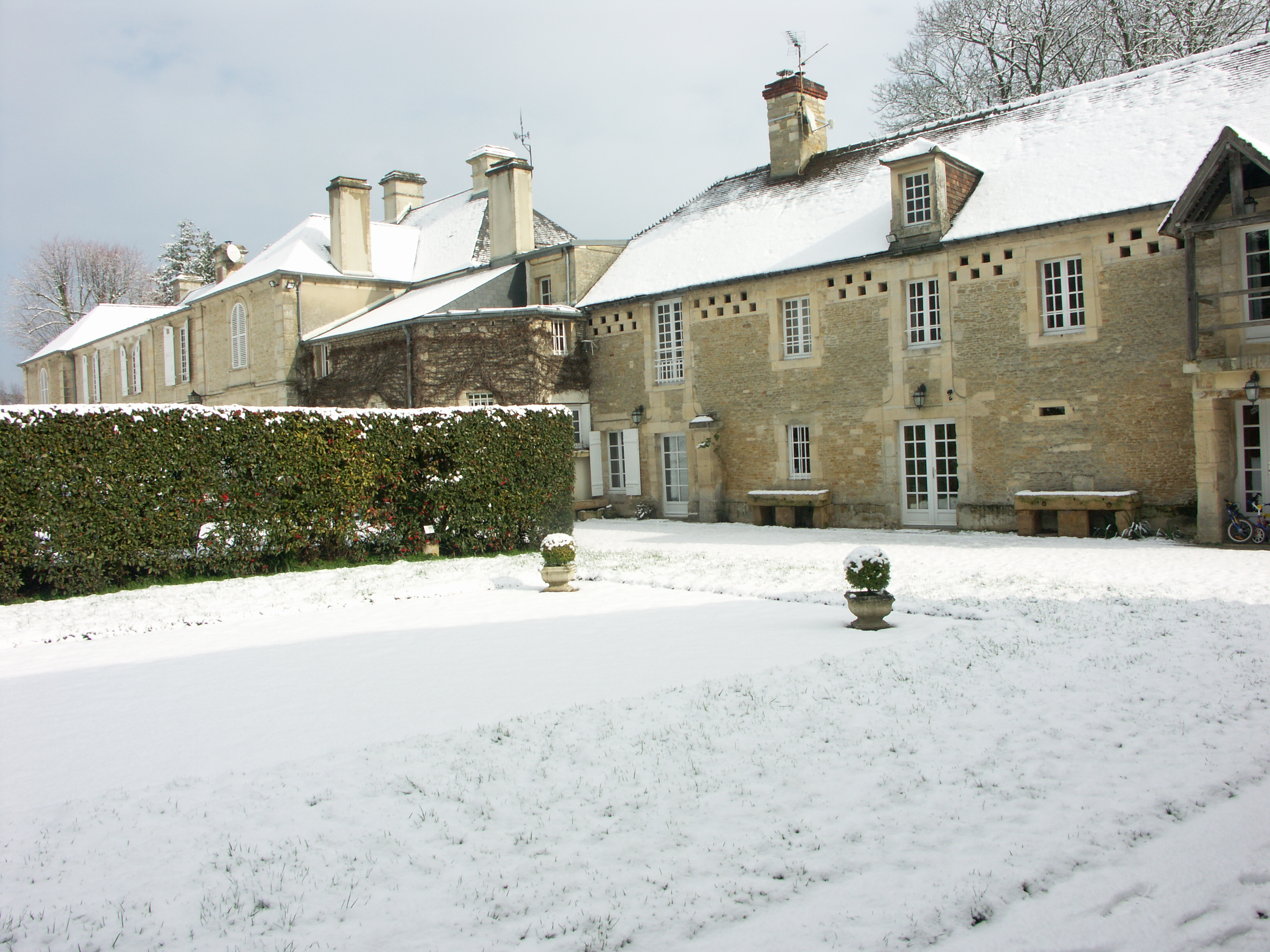 Château de Guernon-Ranville sous la neige, gîtes au premier plan.